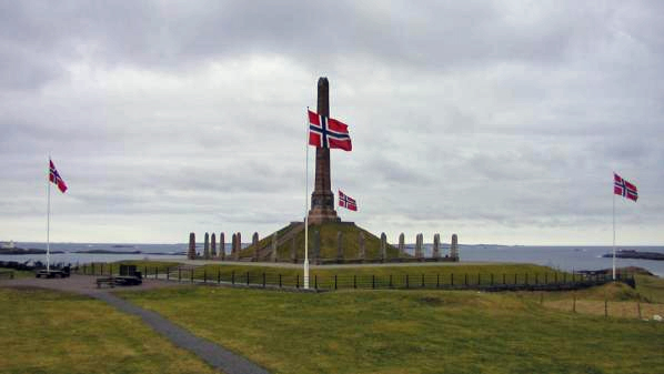 Haraldsstøtten i Haugesund